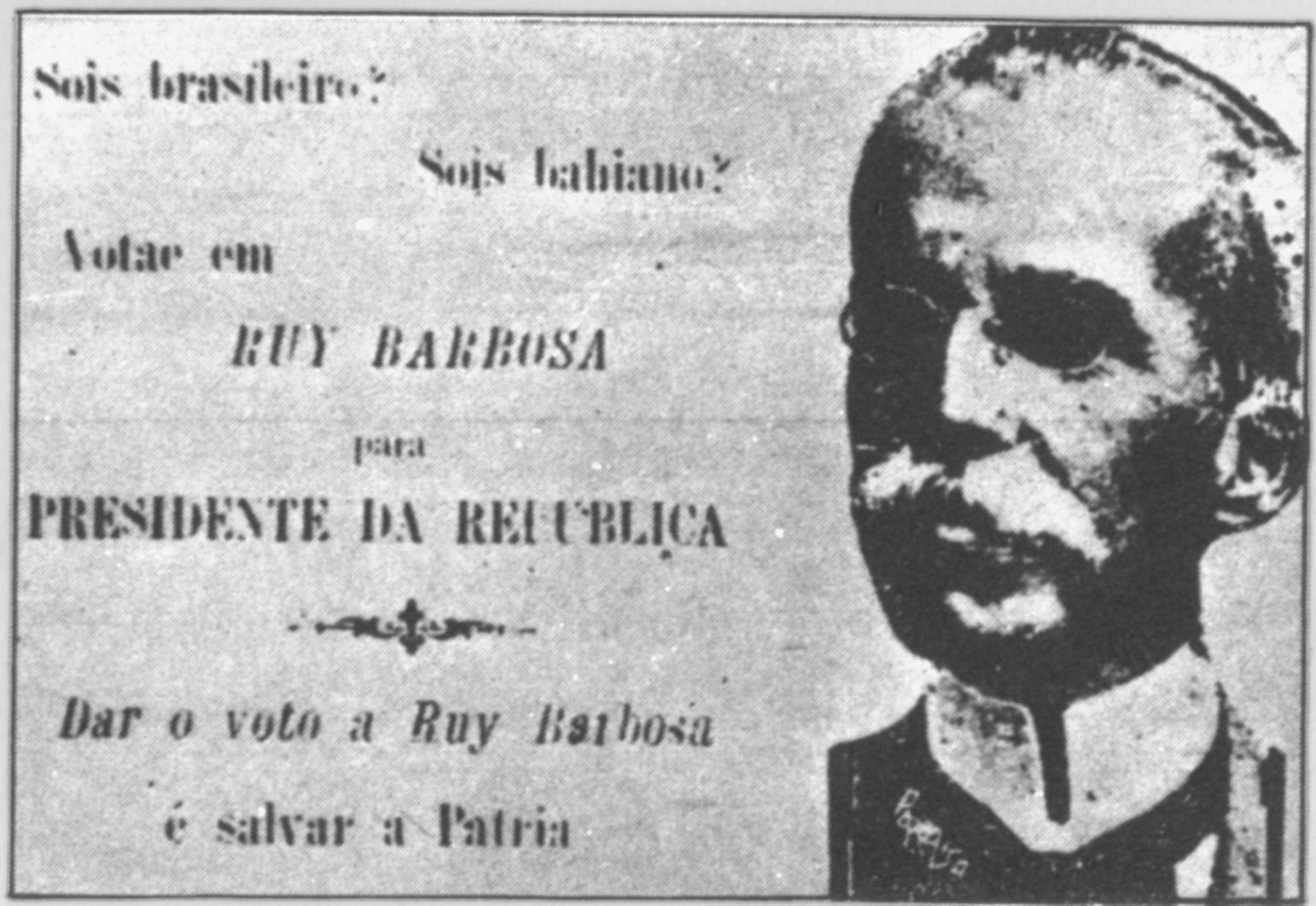 Folheto de campanha presidencial brasileira de Ruy Barbosa, em 1919